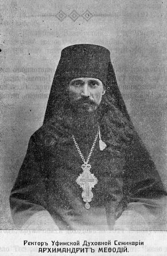 Ректор Уфимской духовной семинарии Мефодий (М.П.Краснопёров) (1868 - 1921).